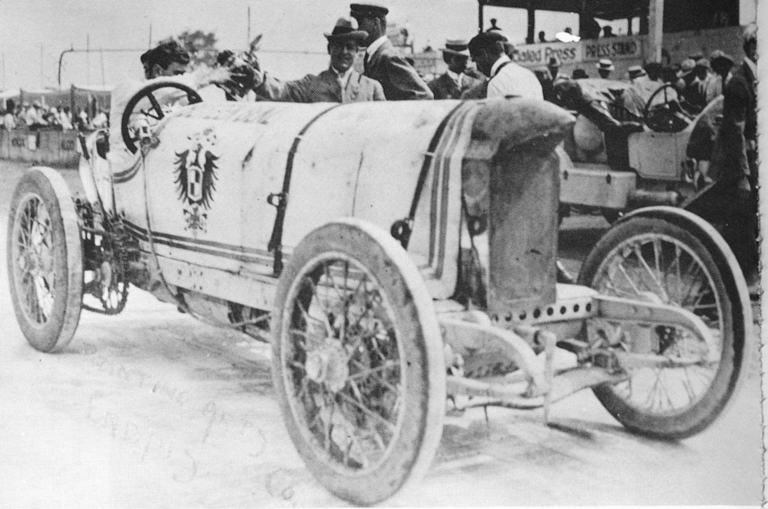 Bildbeschreibung: Blitzen-Benz Quelle: Mediaseite der DaimlerChryslerAG Genehmigung: "Gern können Sie für Ihre Tätigkeit für die Wikipedia Inhalte der DaimlerChrysler Medienseiten verwenden. Dazu erkennen wir die Bedingungen nach GNU-FDL an. Das Angebot bezieht sich auch auf die vorhandenen Bilder."(Dr.Josef Ernst, Communications, DaimlerChrysler AG)